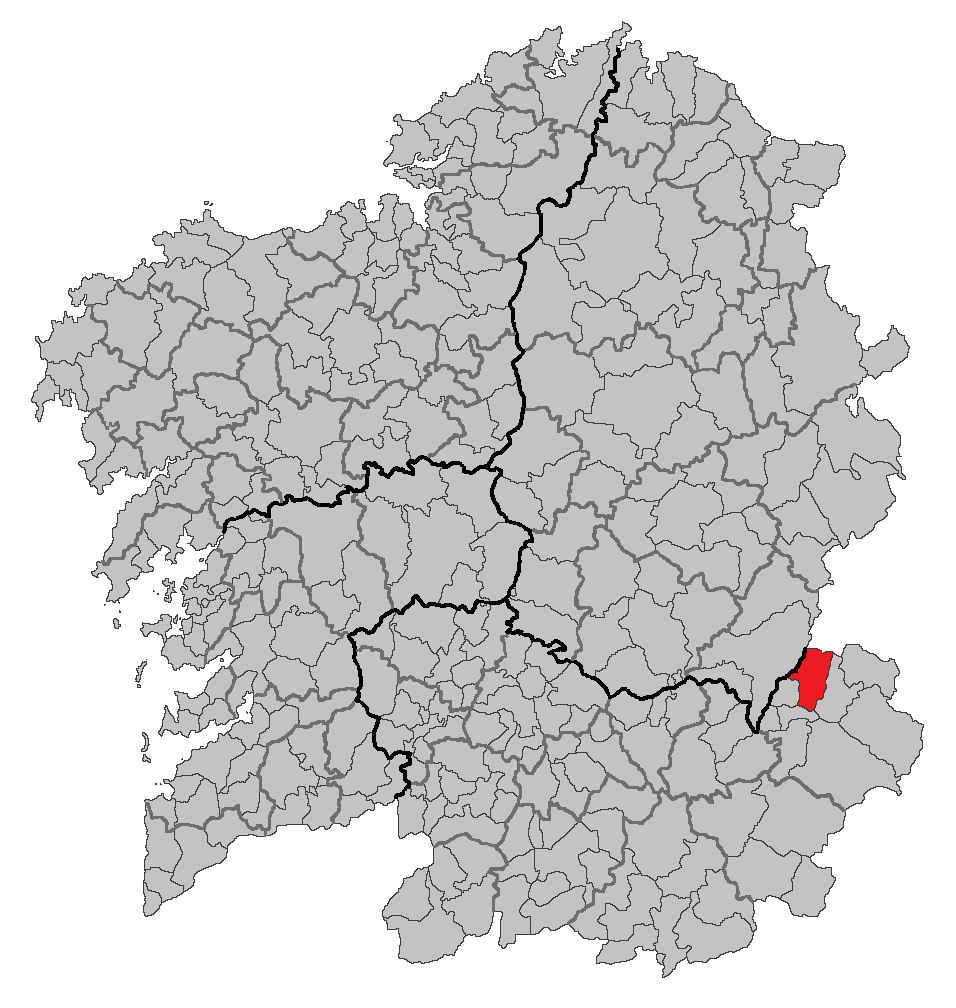 Mapa coa localización do concello de Vilamartín de Valdeorras.